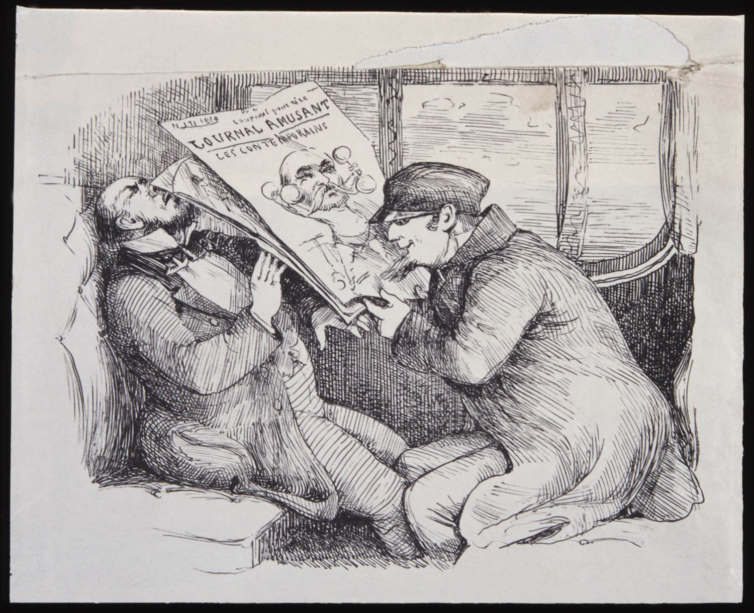 Två män i en tågkupé. Tusch av Fritz von Dardel